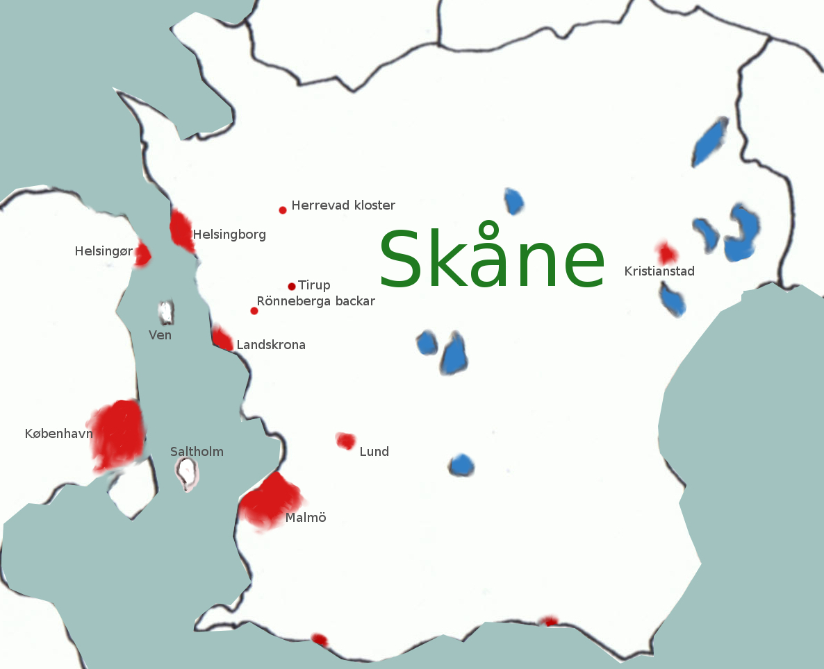 Skåne len under den skånske krigen (1675-1679)